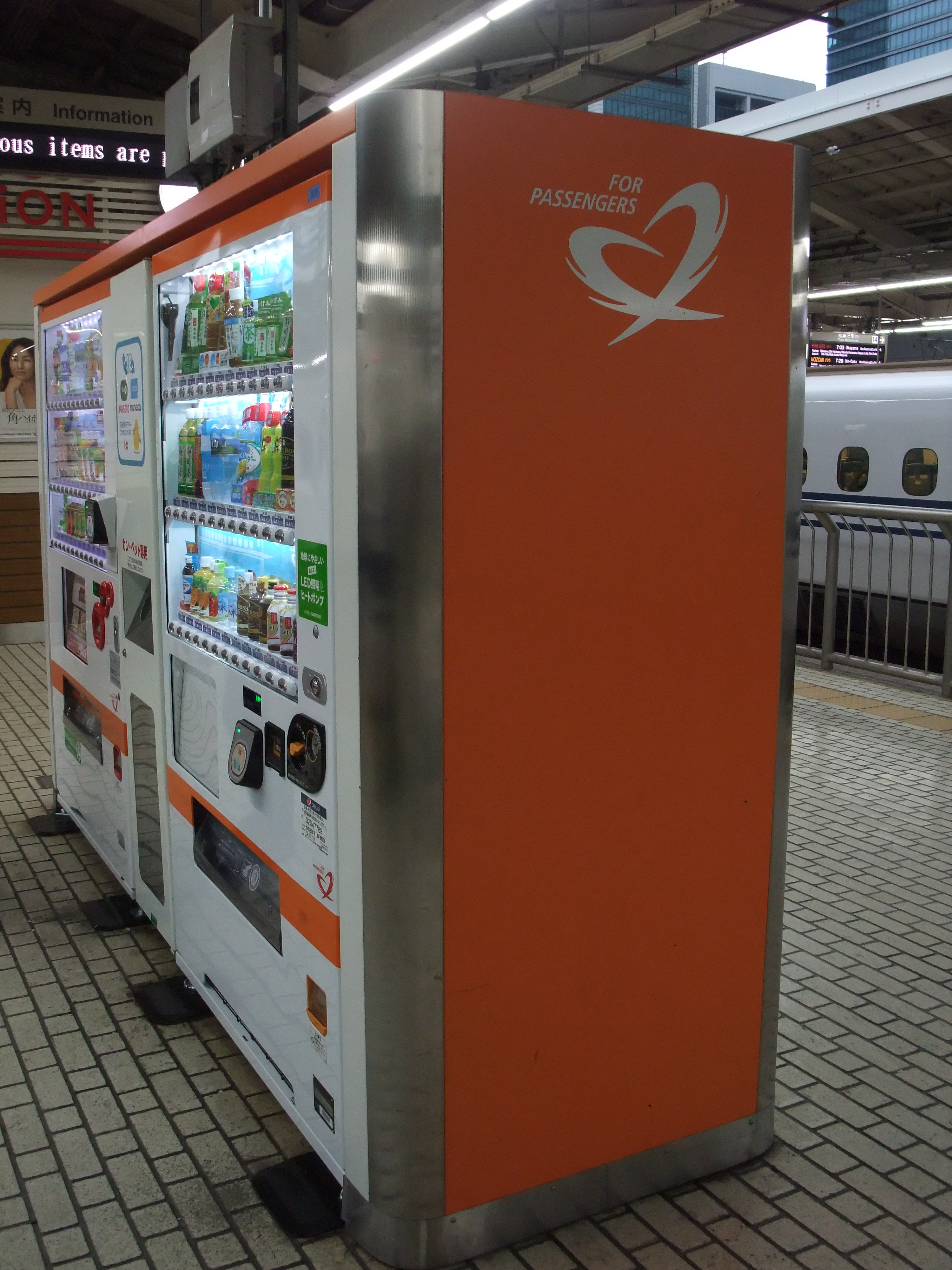 東海道新幹線東京駅ホームの自動販売機、JR東海パッセンジャーズが管理運営する（側面にJR東海パッセンジャーズのロゴ入り）